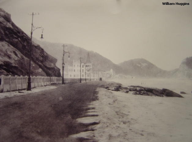 Avenida Atlântica em 191X, esquina com a atual rua Fernando Mendes